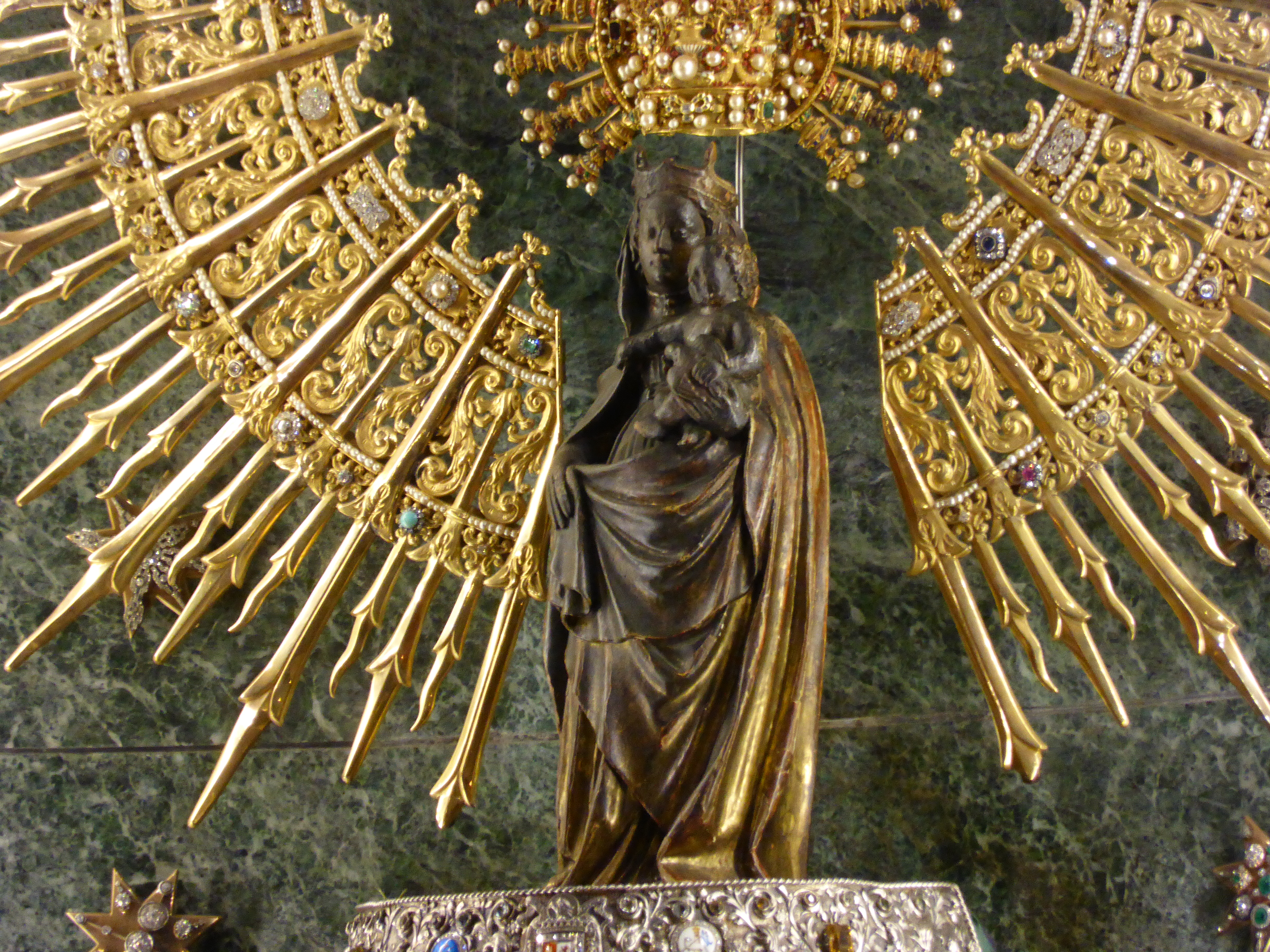 Nuestra Señora del Pilar de Zaragoza. Escultura de estilo gótico tardío franco-borgoñón, hacia el año 1435.